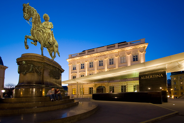 Albertina in der Dämmerung